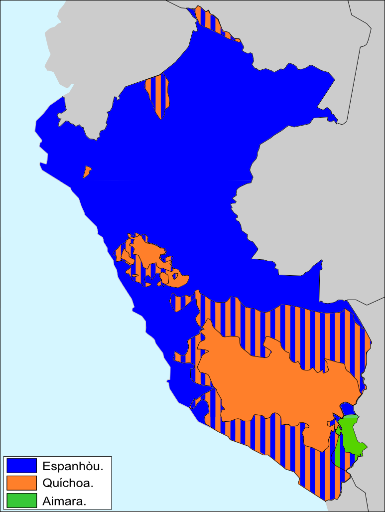 Esquèma generau dei lengas de Peró.